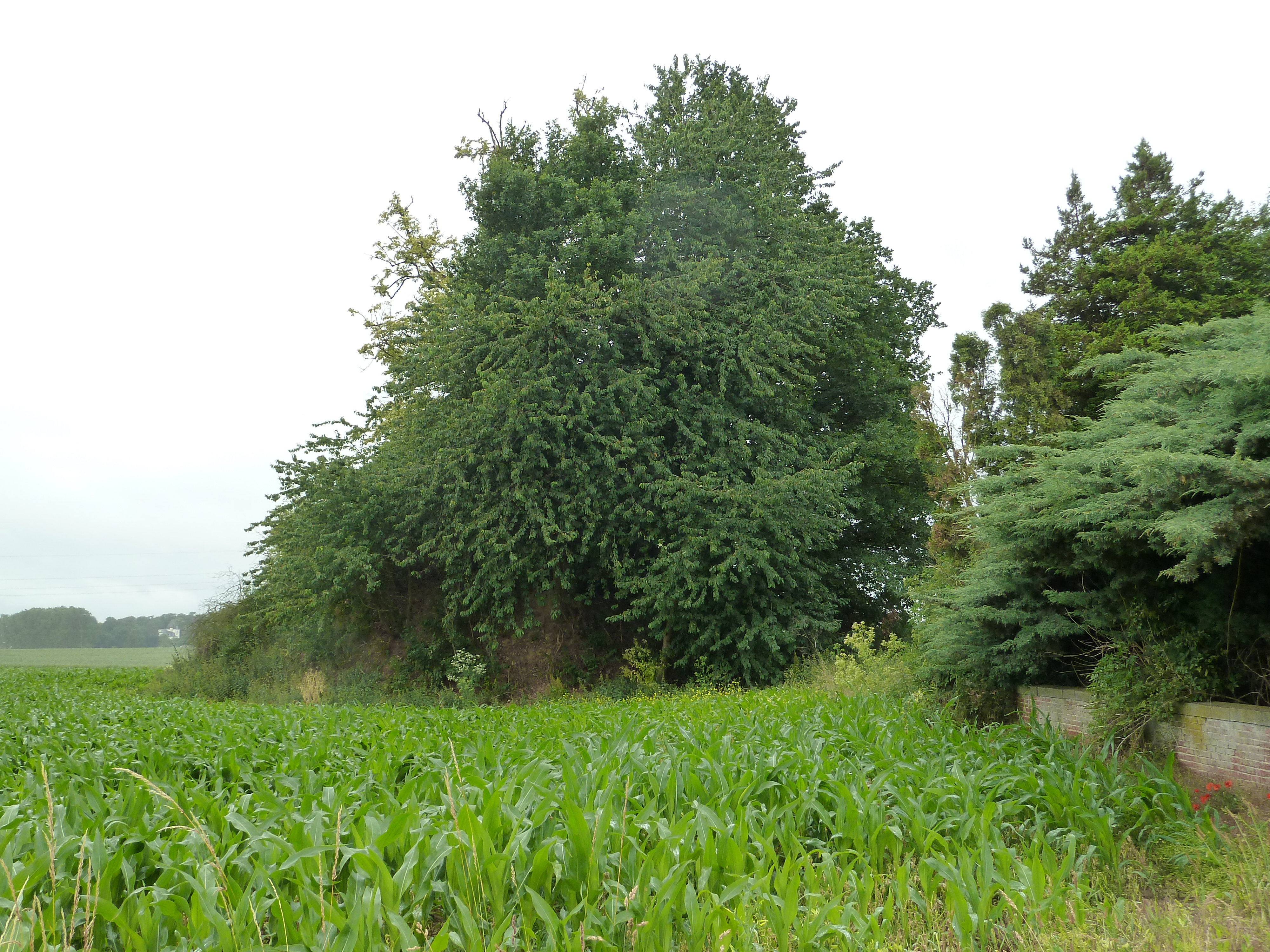 Les Cinq Tombes d'Omal, Geer, Belgique